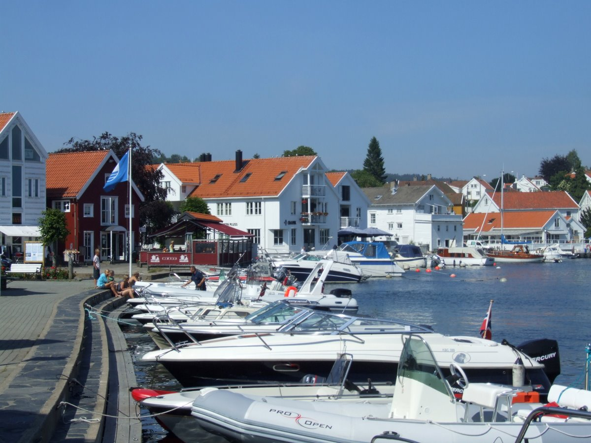 Lillesand